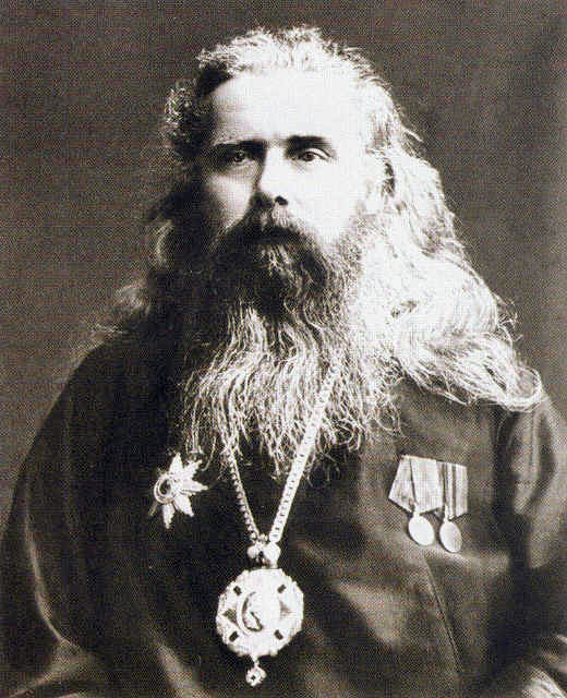 Кирилл (Смирнов), архиепископ Тамбовский и Шацкий